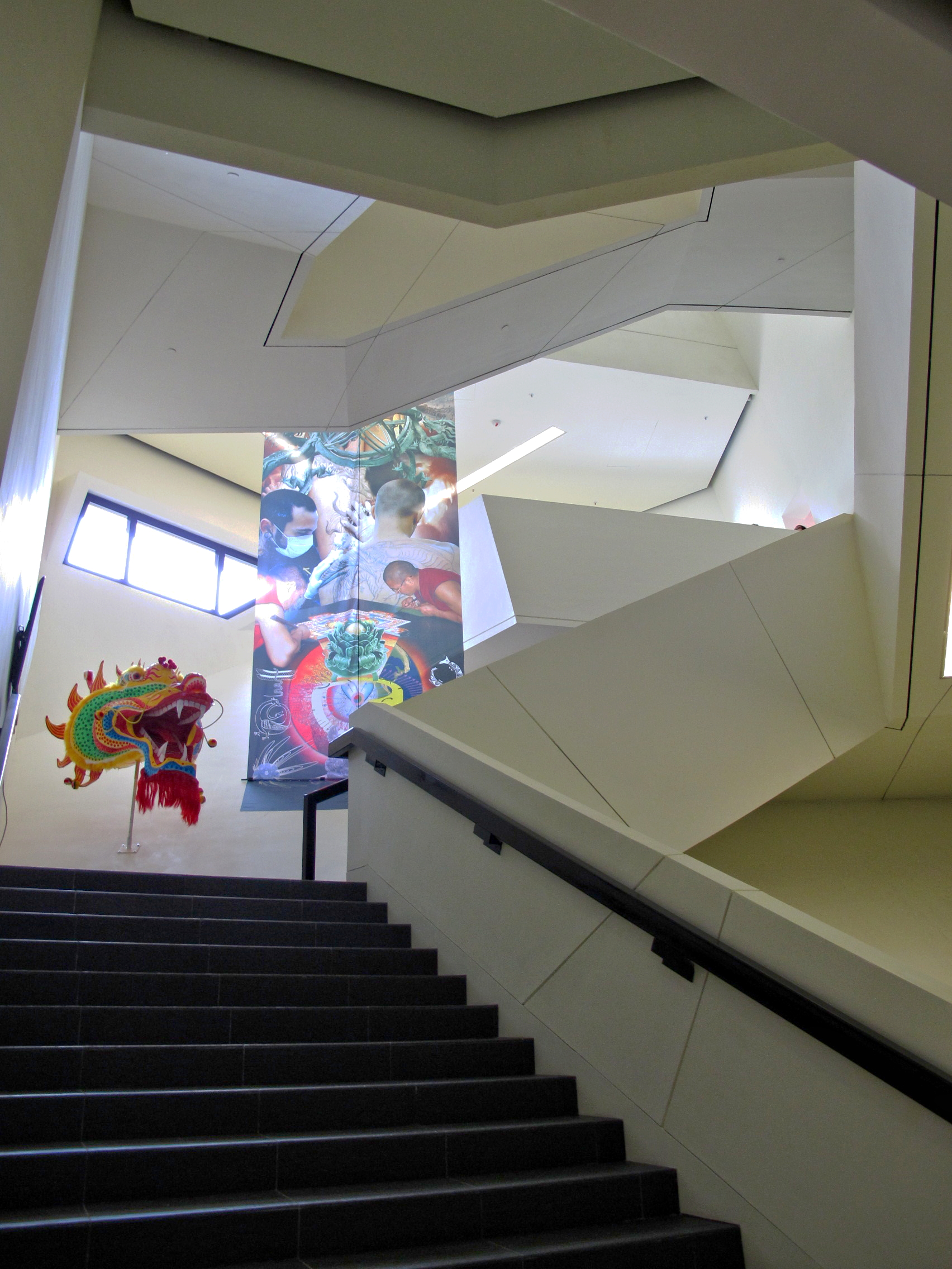 CityU Run Run Shaw Creative Media Centre Stair